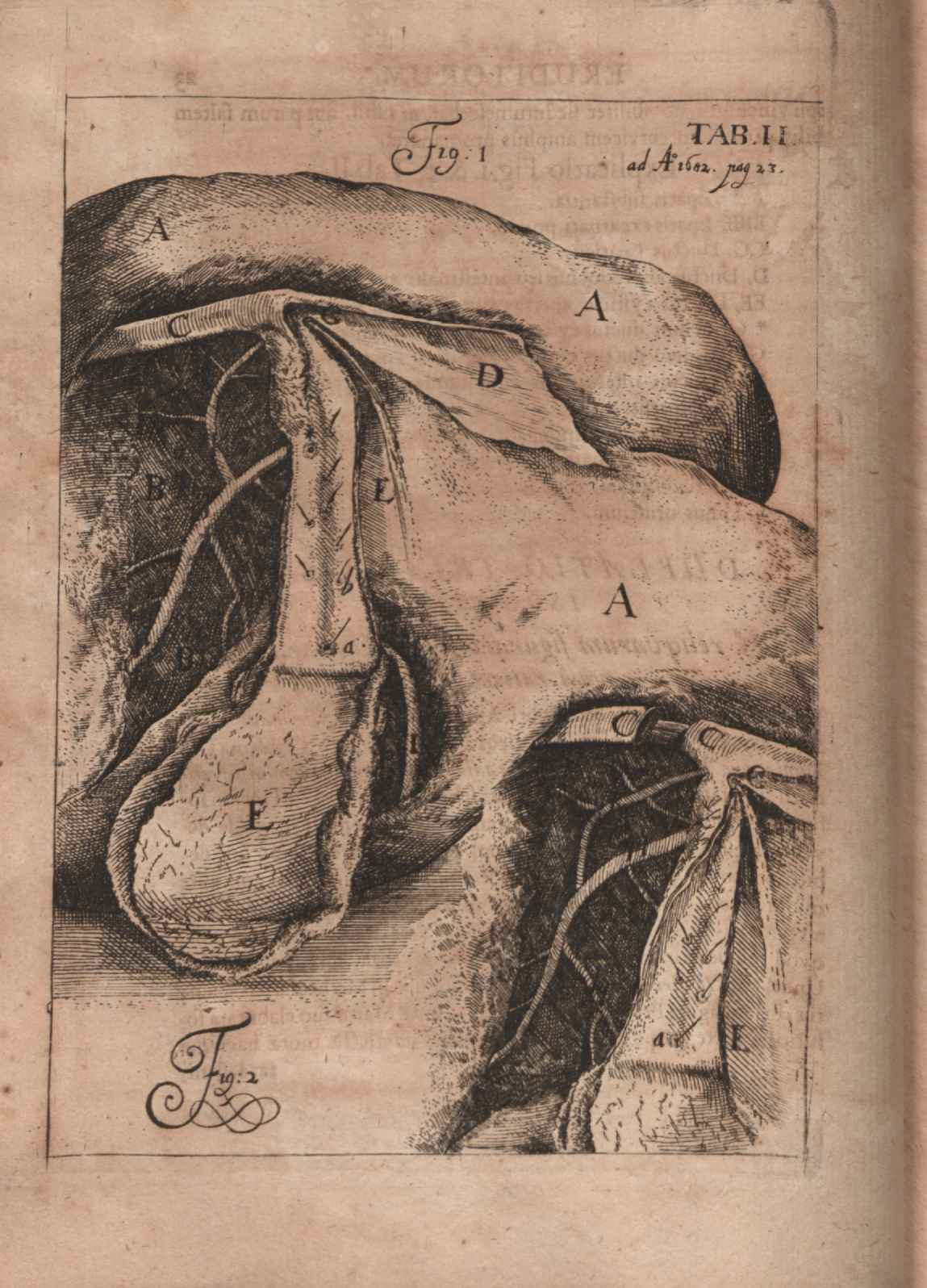 Illustration